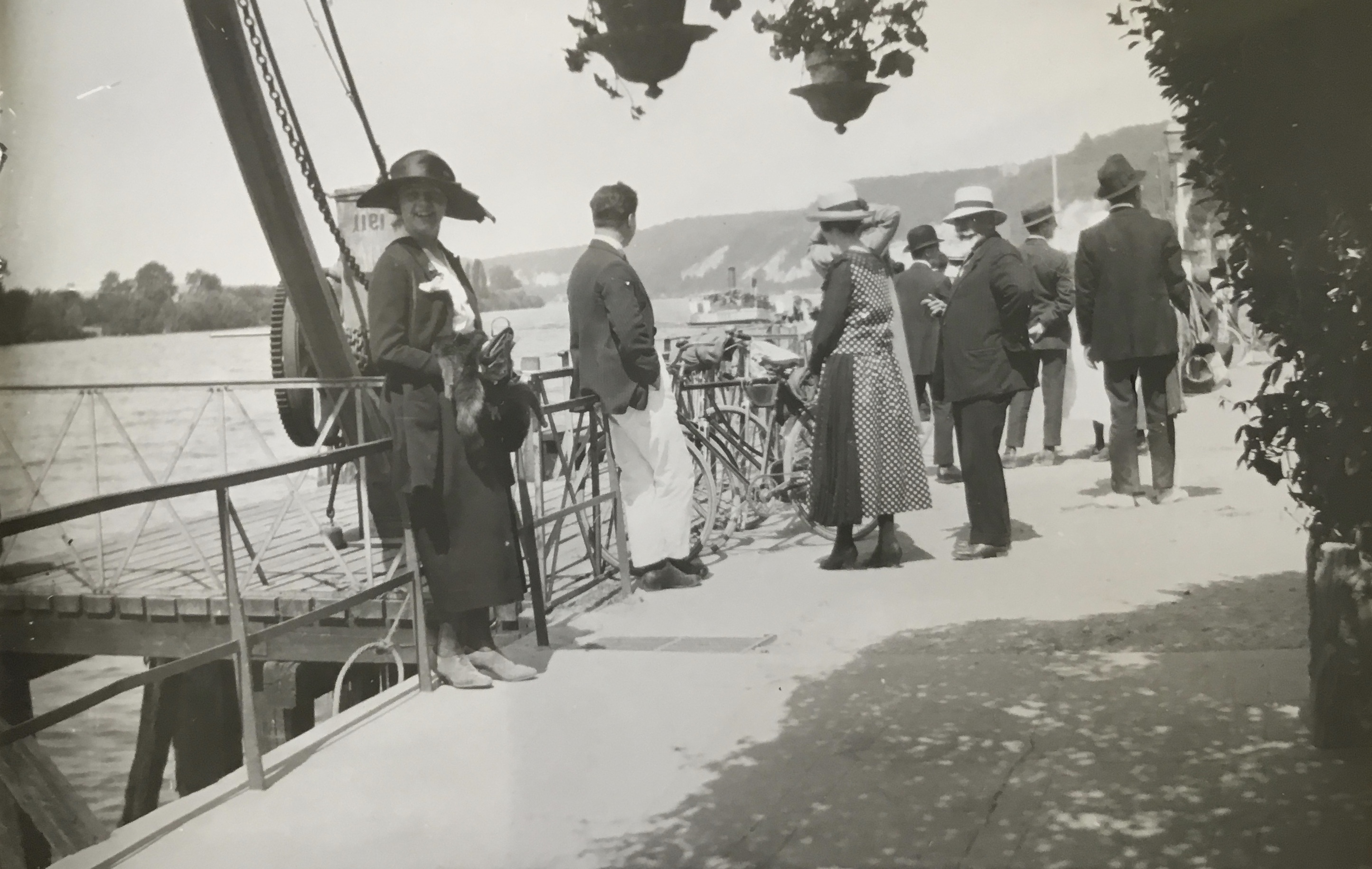 En attendant le bac pour traverser la Seine